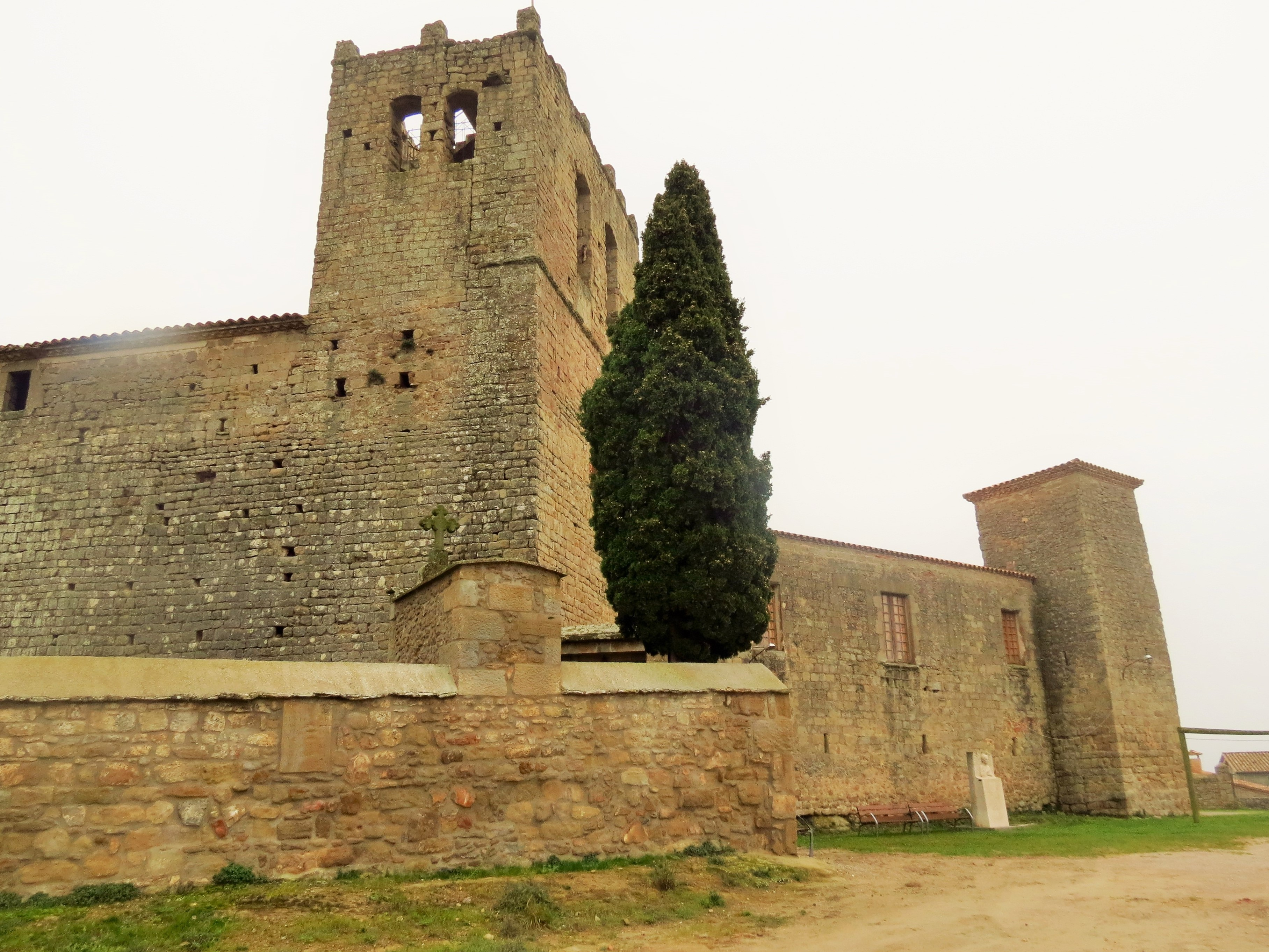 exterior